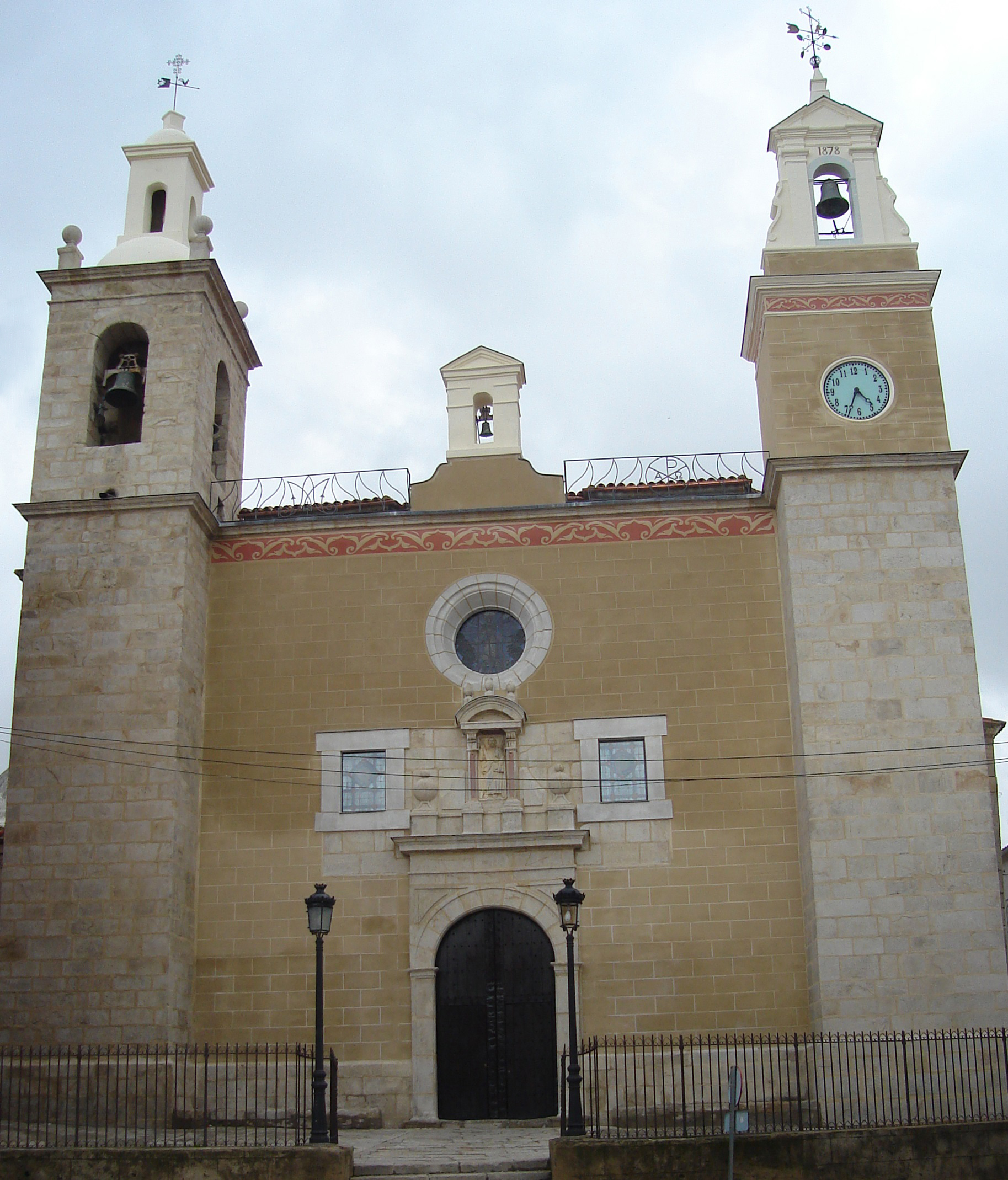 La iglesia de San Andrés es la principal iglesia parroquial del municipio español de Torrejoncillo en la provincia de Cáceres. Su construcción se inició en el siglo XVI.